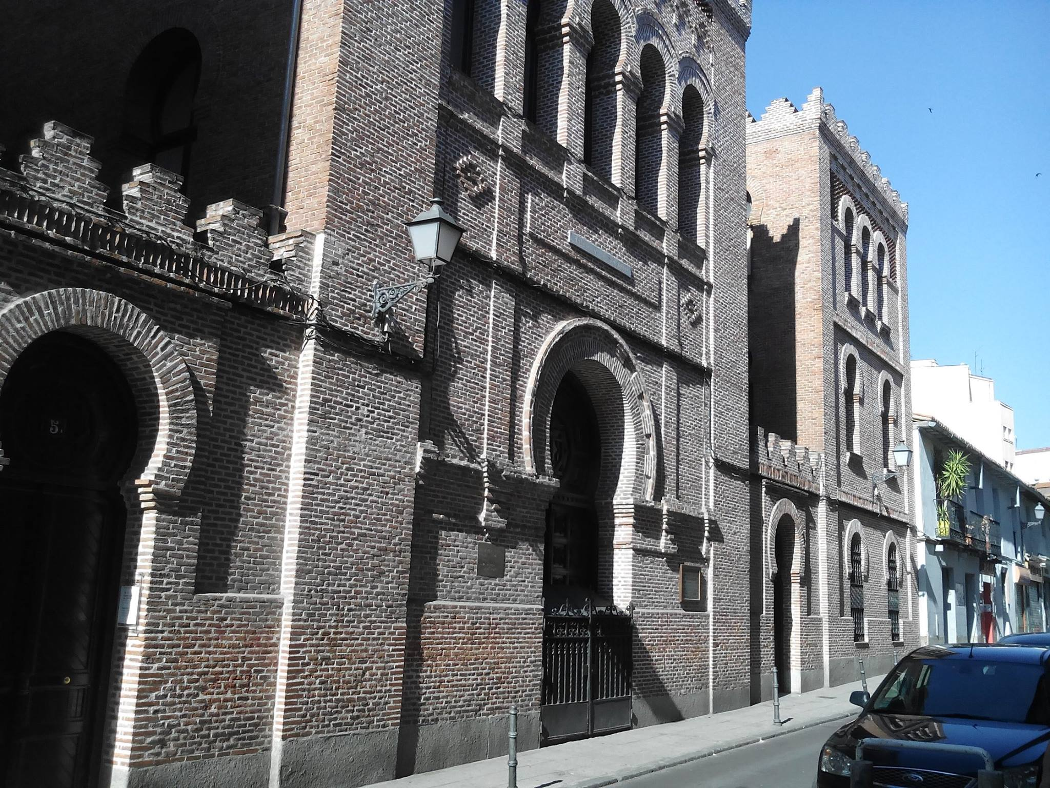 Facade néomudéjar du temple protestant de la calle Noviciado, à Madrid